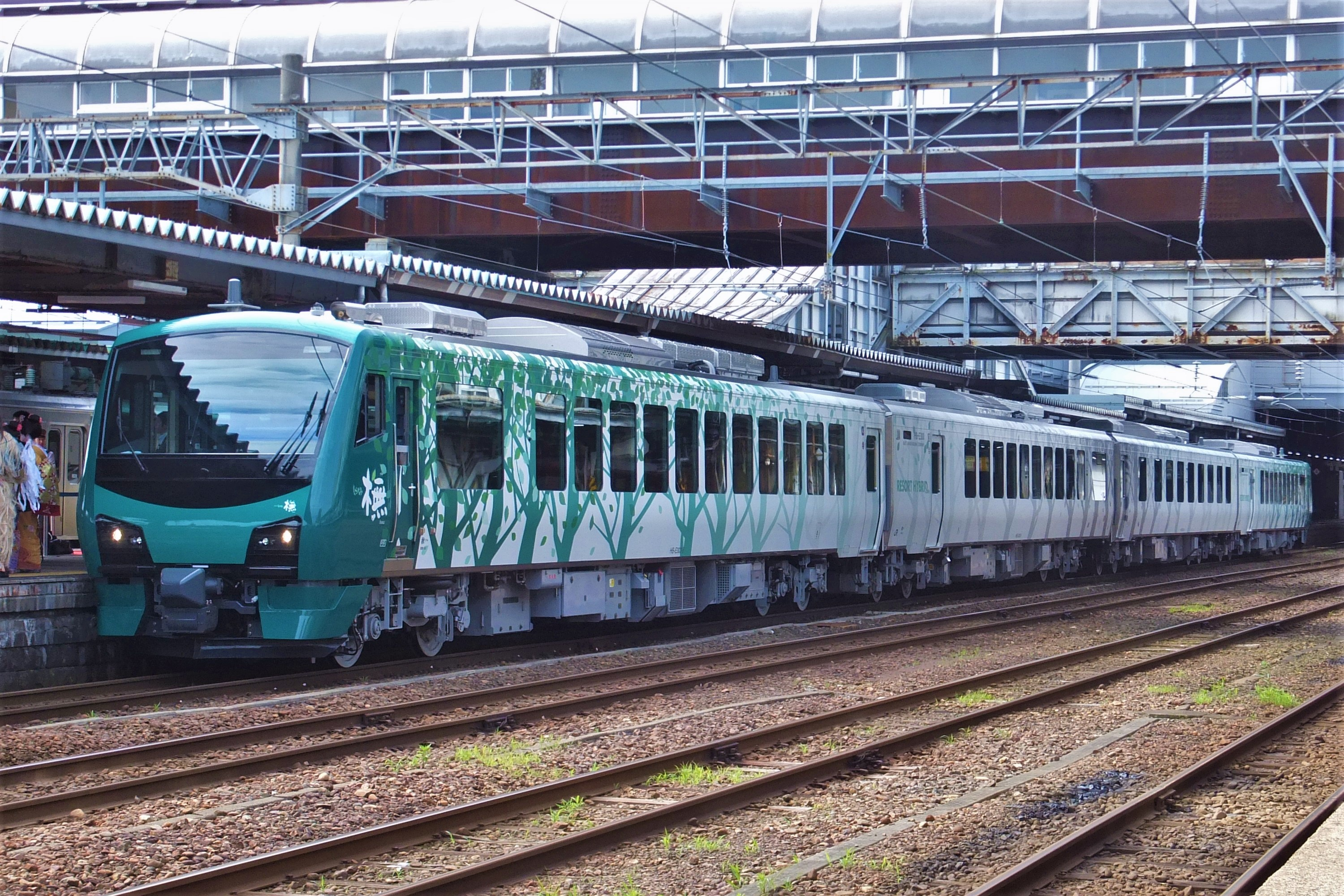 2016年7月16日に運行を開始した新型リゾートしらかみ、橅編成